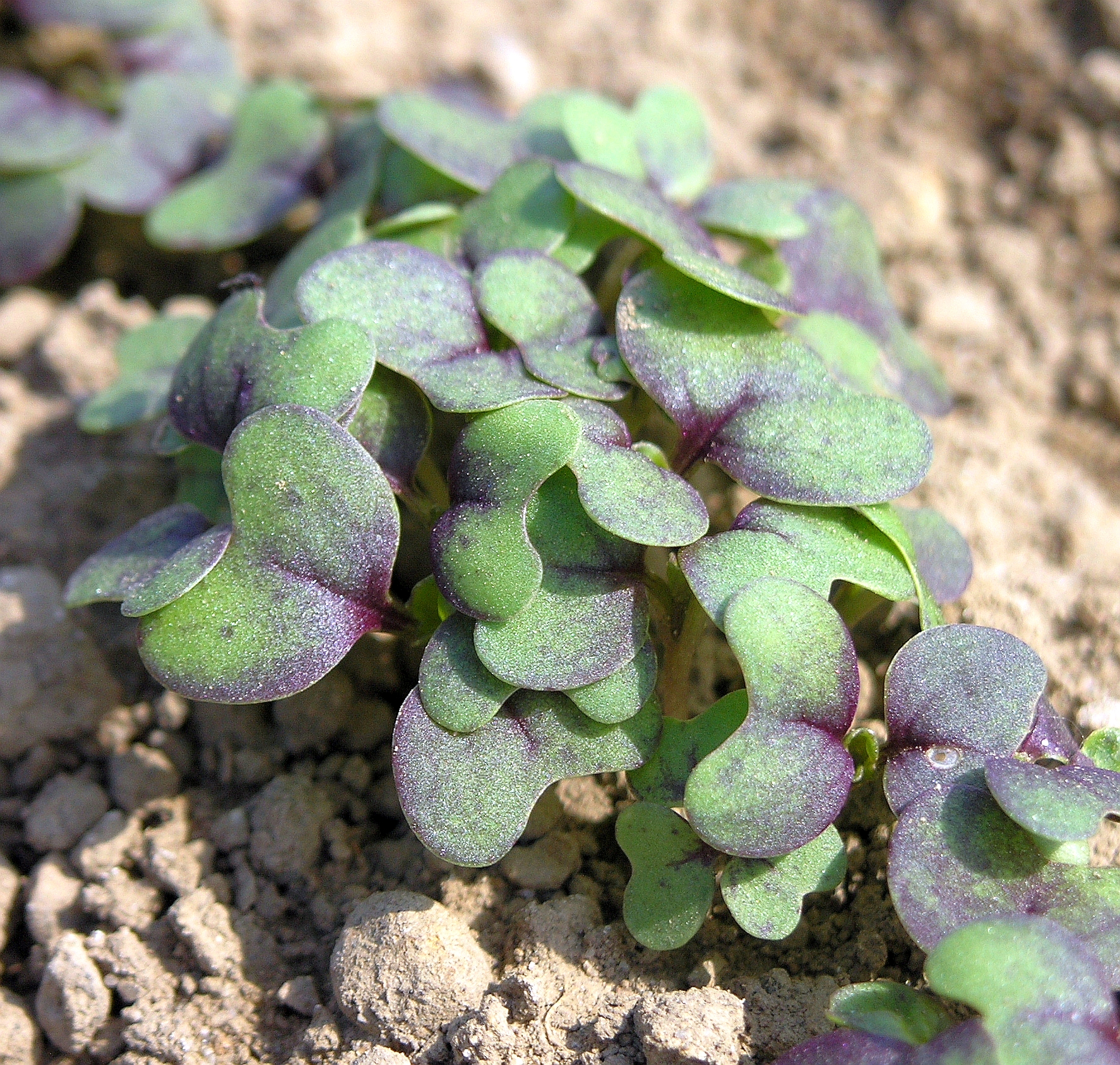 Keimlinge von Rotem Senf, Sprouts of Red Mustard, Red Giant